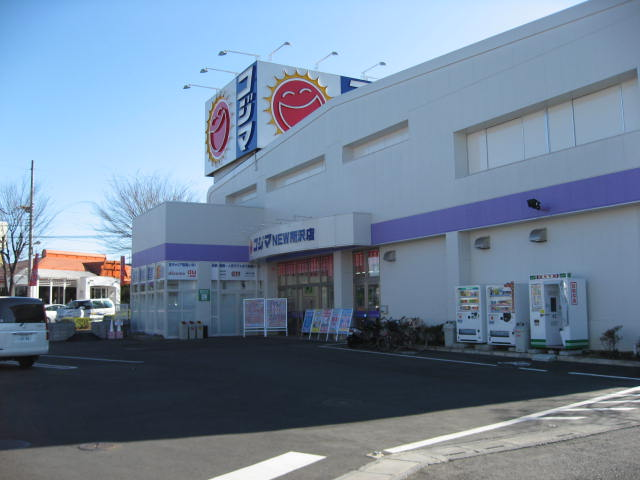 コジマNEW所沢店